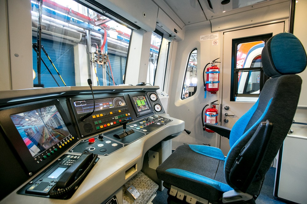 Интерьер кабины машиниста электропоезда метро 81-765/766/767 «Москва»